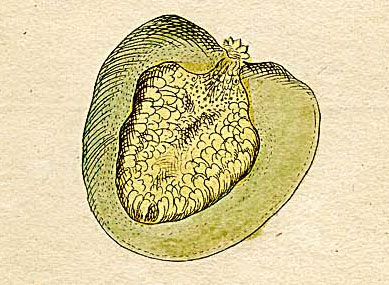 Ausschnitt (Klasse XXIV) aus Ehrets Tafel "Methodus Plantarum Sexualis"